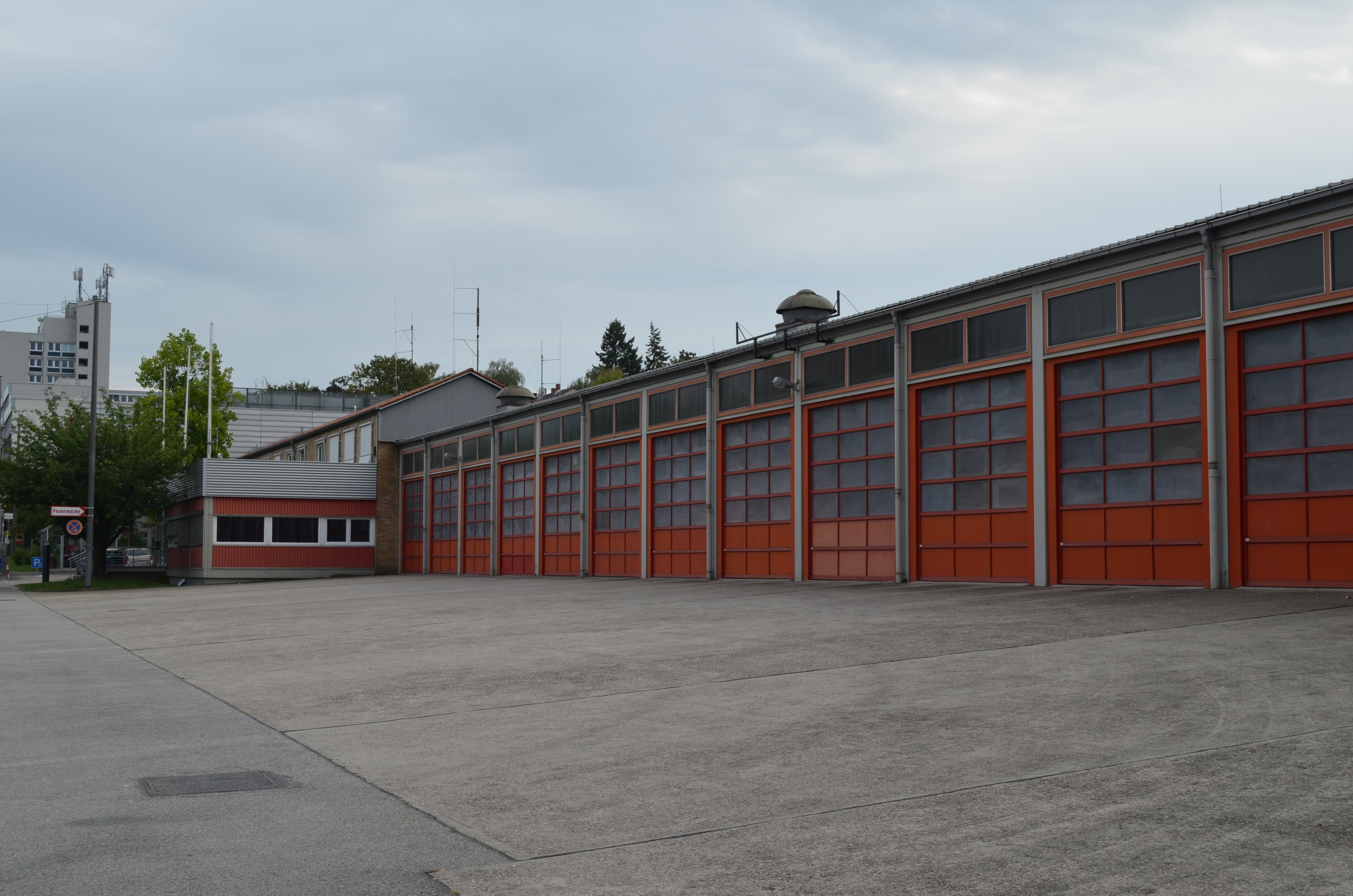 Feuerwache 1 Wiesbaden, Fahrzeughallen